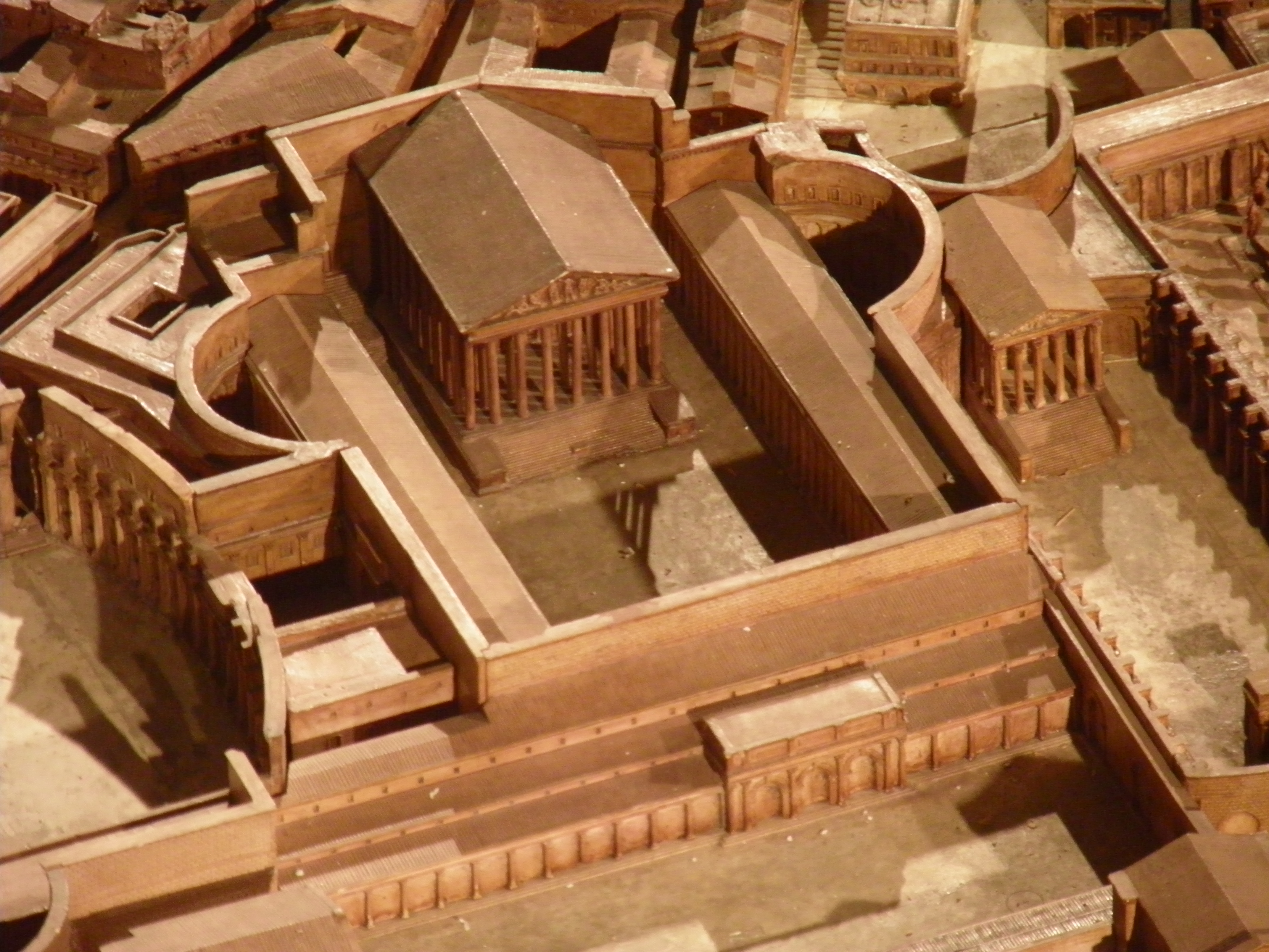 Forum d'Auguste, plan de Rome de Paul Bigot, Caen MRSH